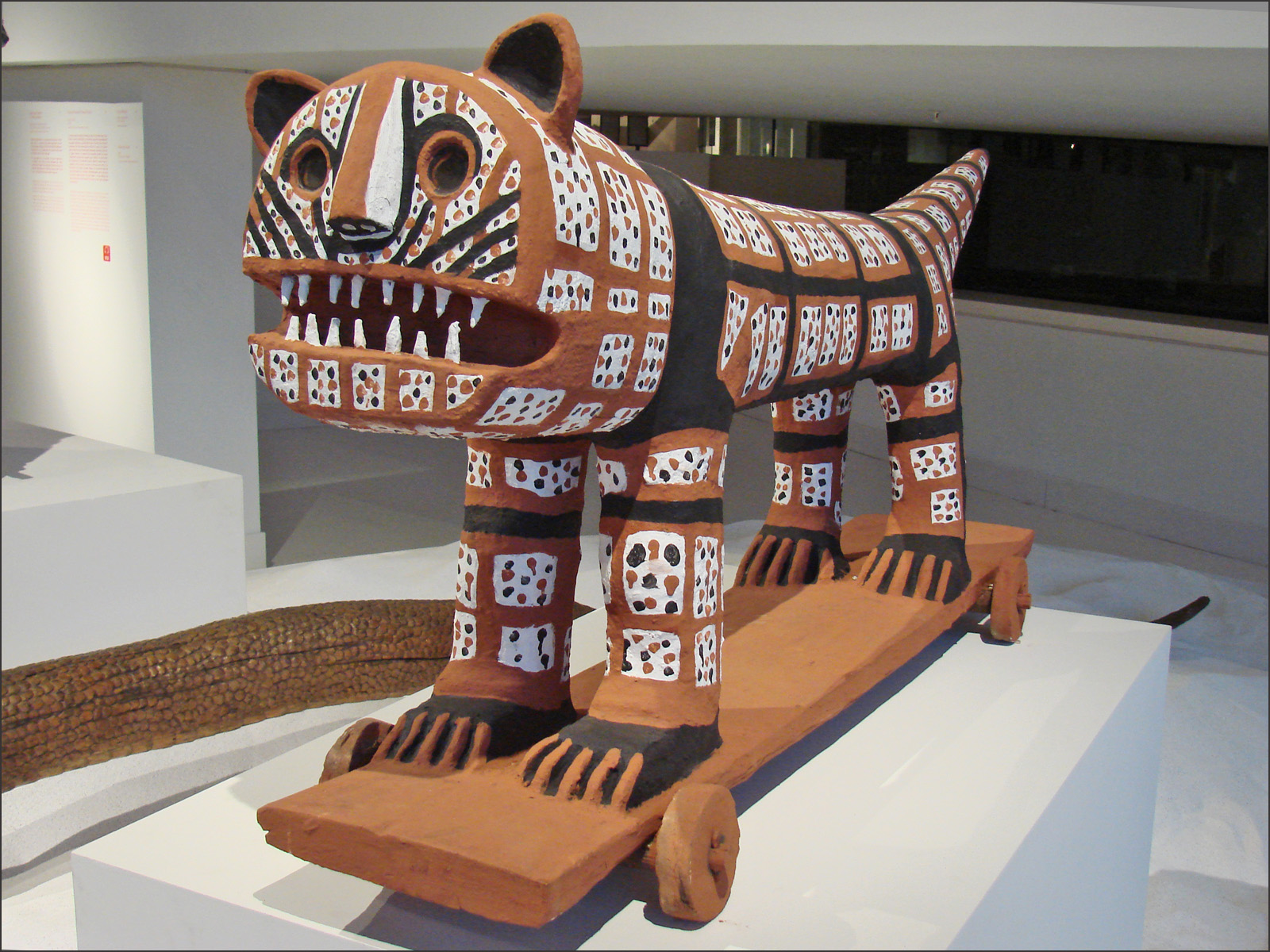 Tigre Bastar Terre cuite peinte 20ème siècle Bharat Bhavan, Bhopal Image de l'exposition "Autres Maîtres de l'Inde, créations contemporaines des Adivasi " Musée du Quai Branly Paris